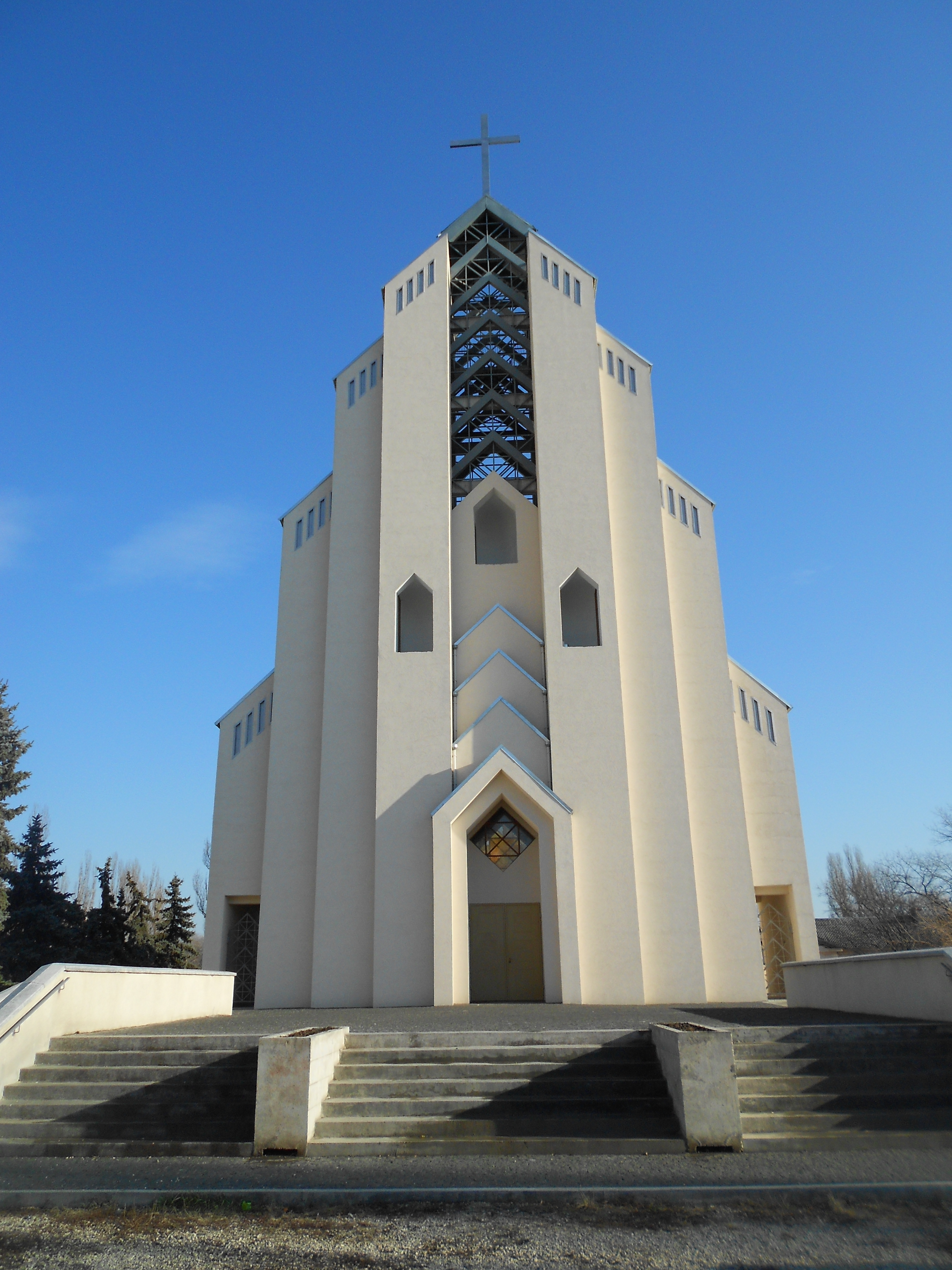 Biserica Sfinții Arhangheli din Bălți